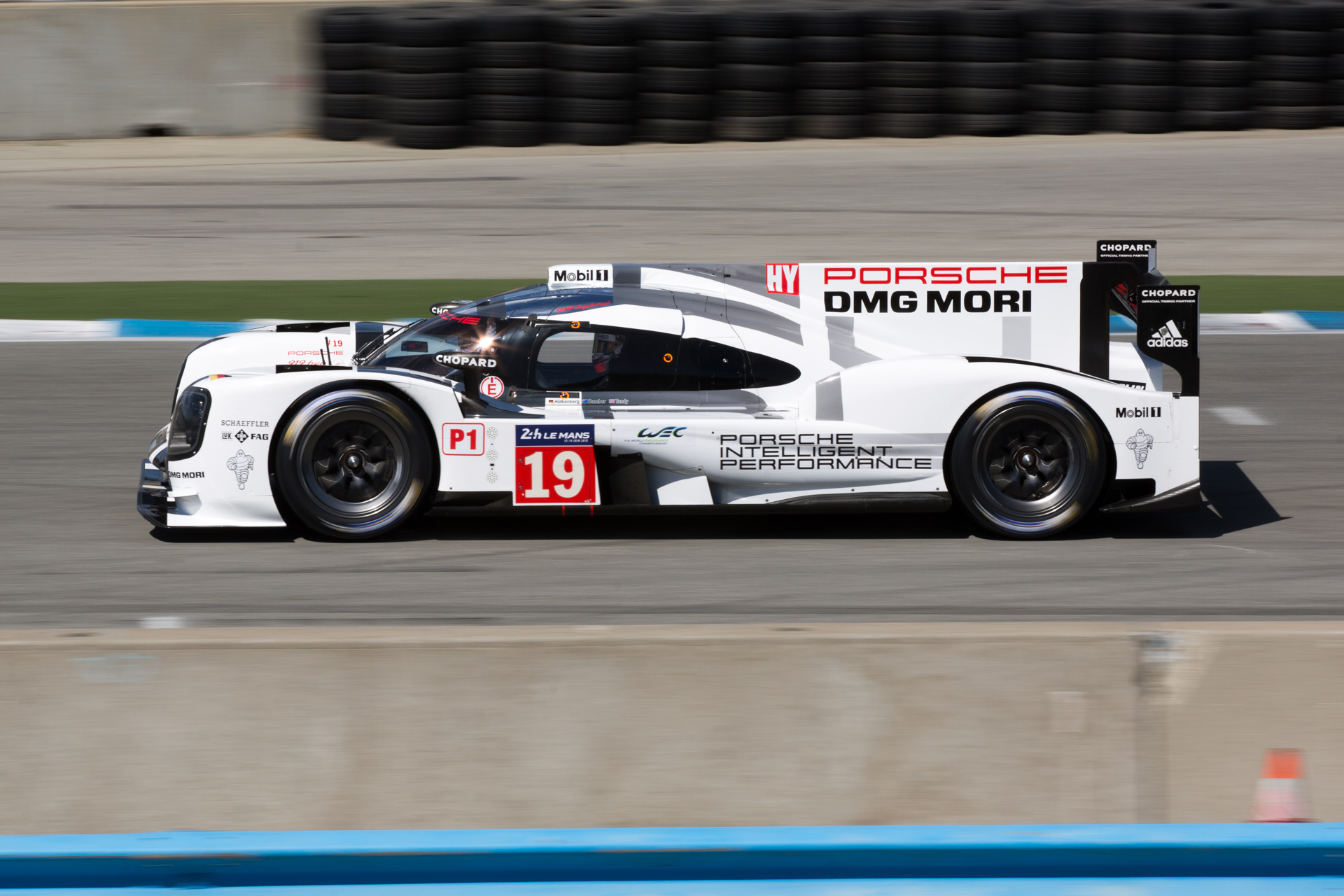 Rennsport Reunion V